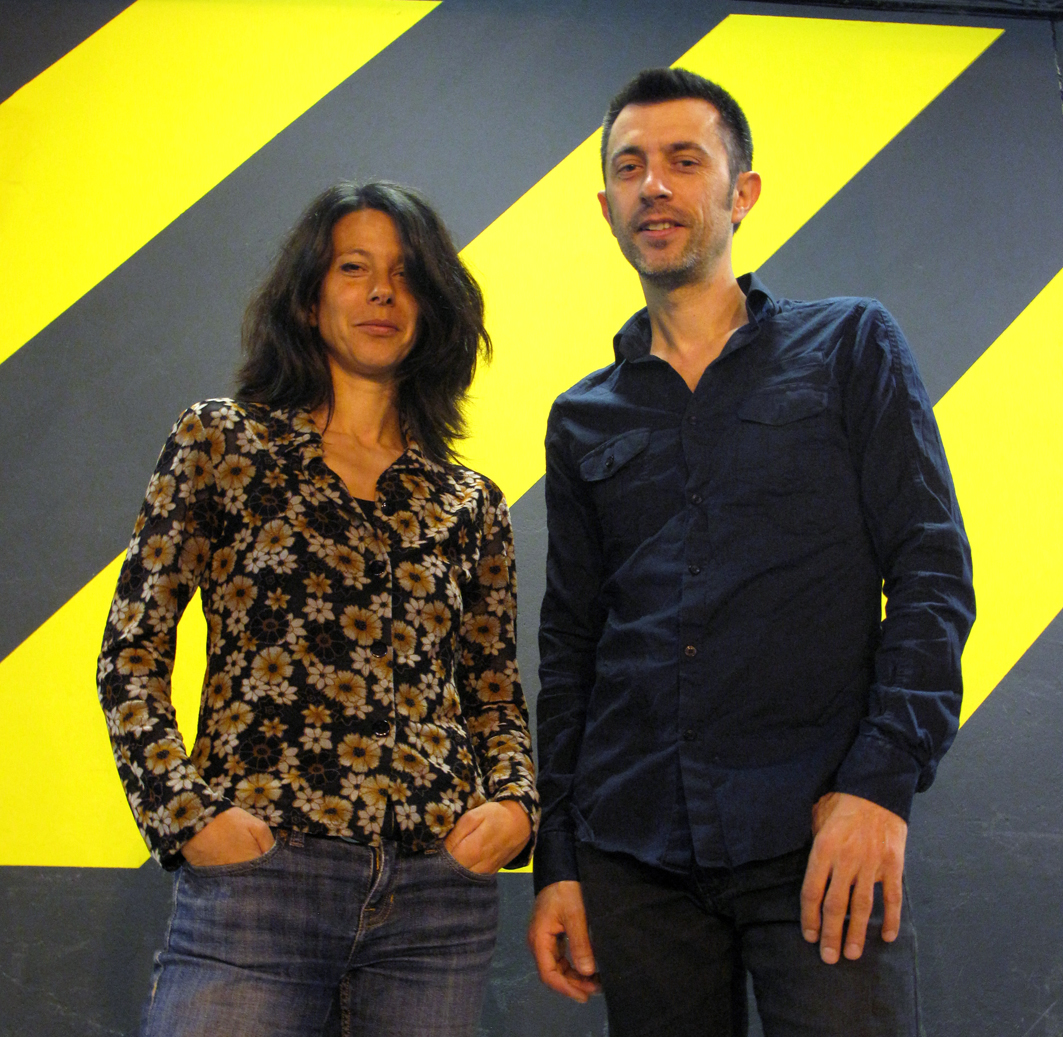 LES GENS DU QUAI COMPAGNIE dirigée par Anne Lopez et François Lopez